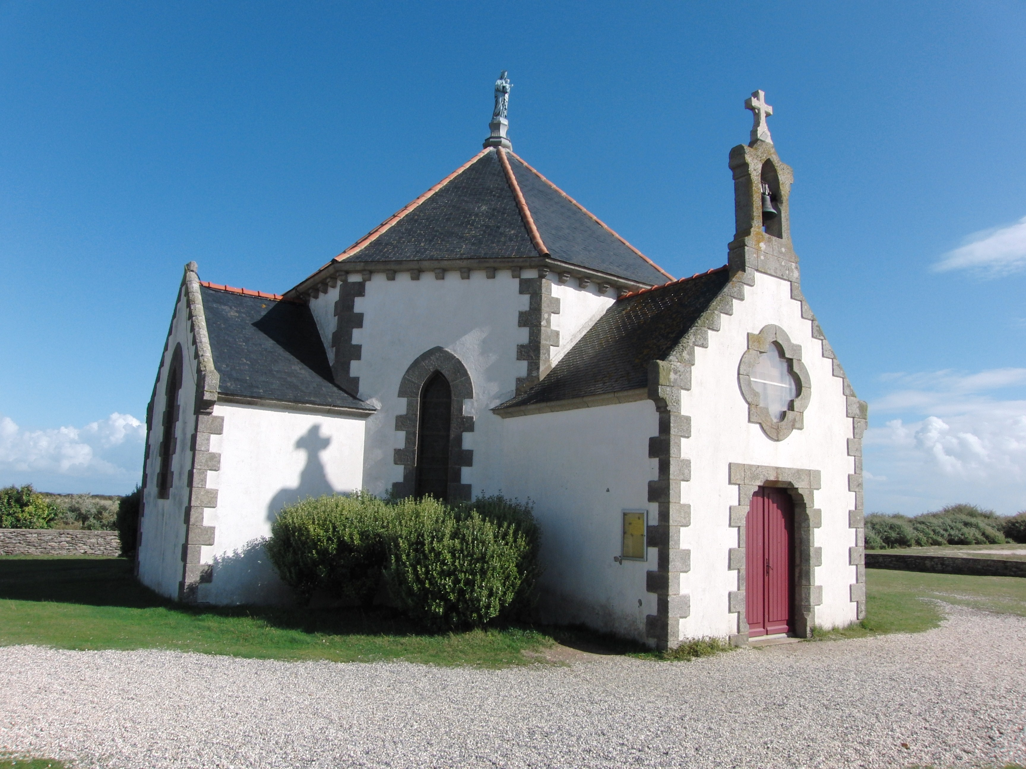 La La chapelle Notre-Dame-de-la-Côte (Penvins). Sarzeau dans le Morbihan Bretagne .